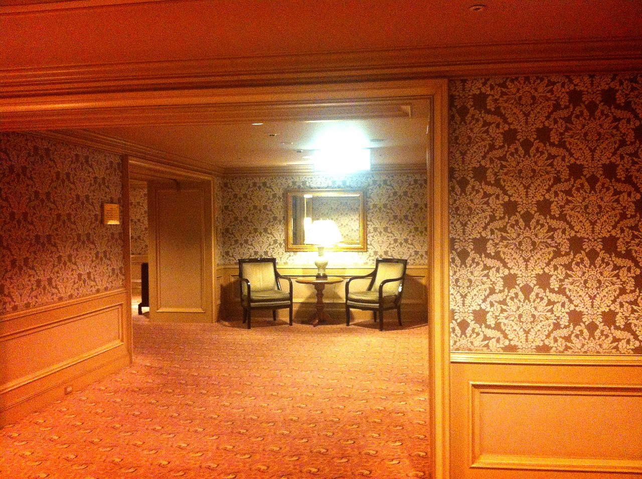 ホテル椿山荘の中 (Inside Hotel Chinzanso Tokyo)